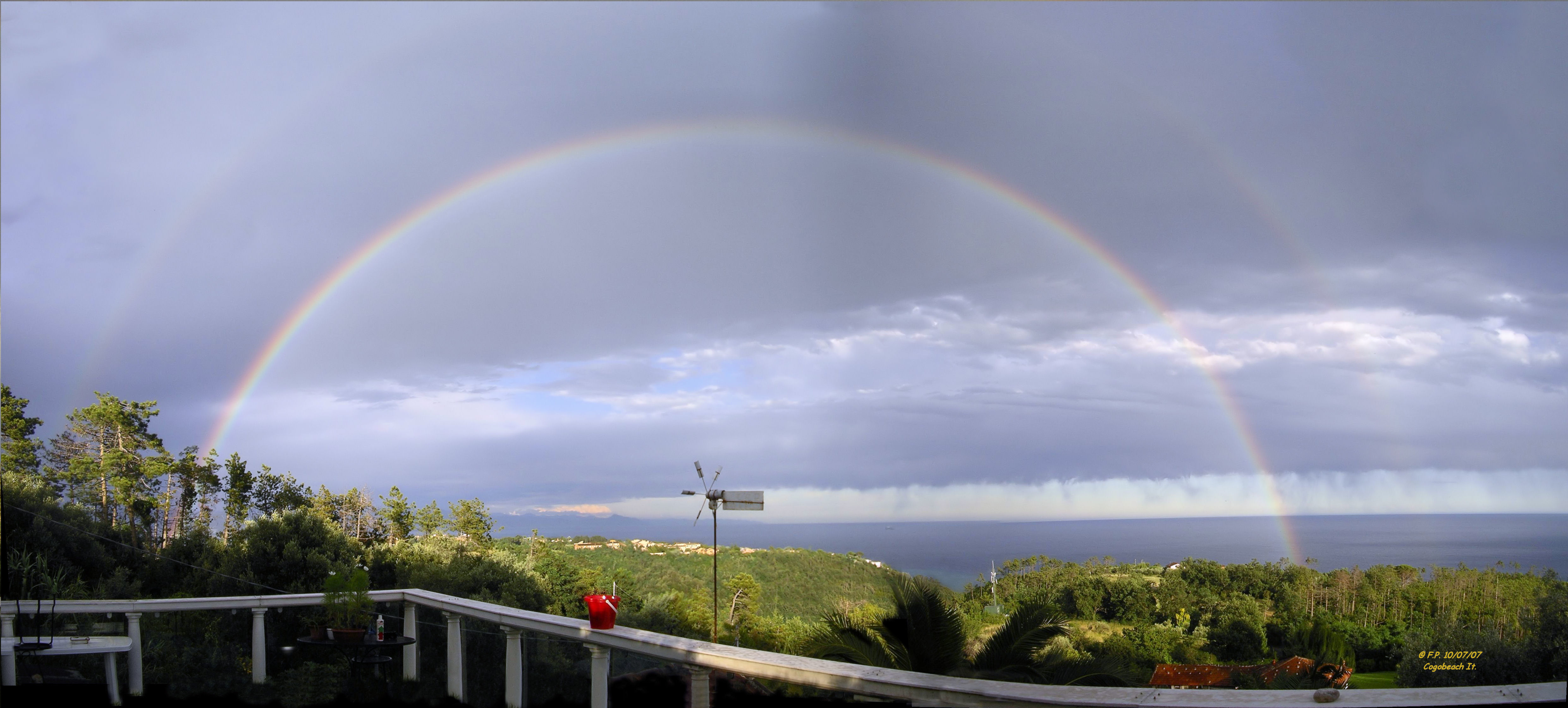 Arcobaleno a Cogoleto (Ge). Collage di 8 scatti.